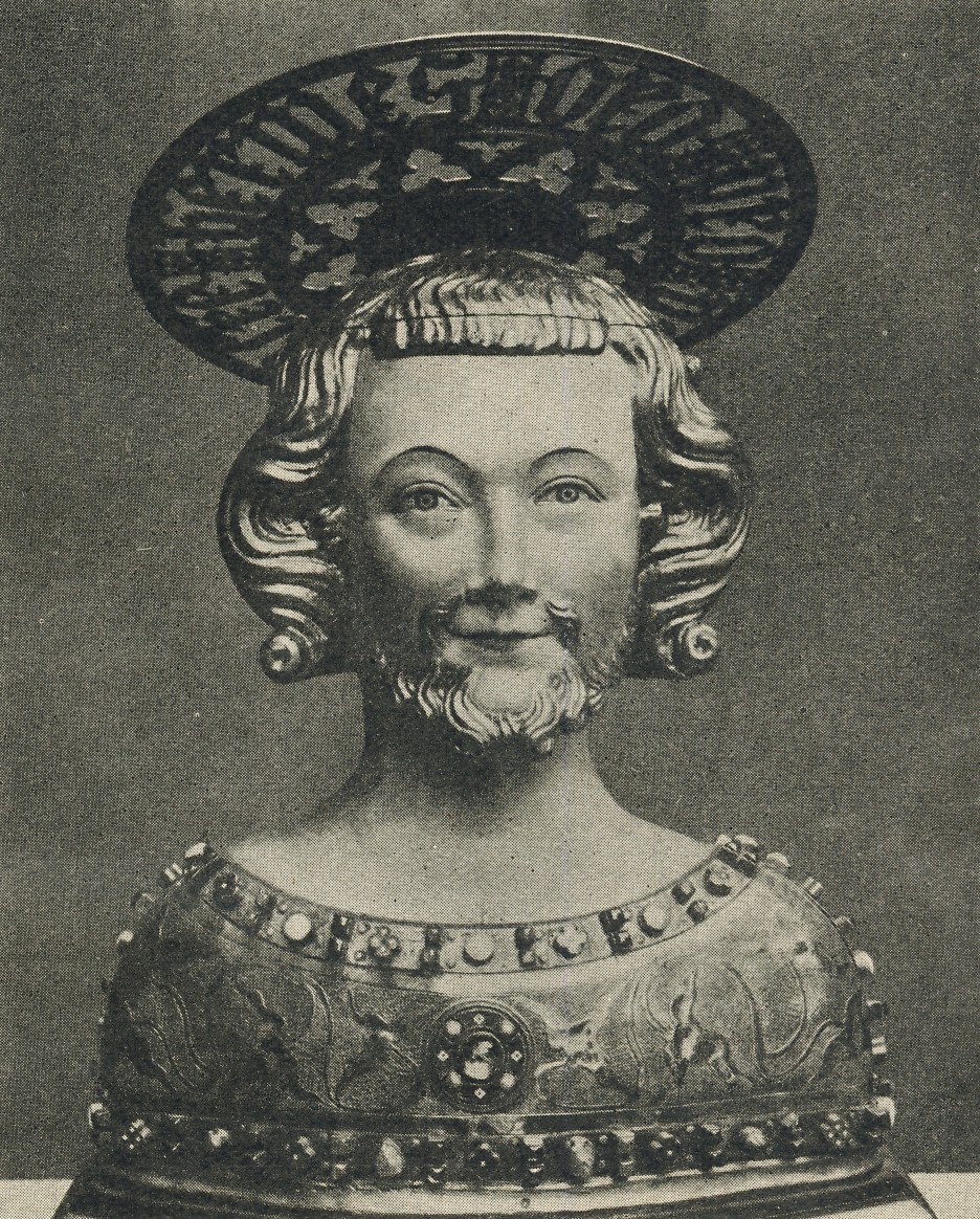 Büstenreliquiar des Hl.Hermes (Schädeldeckereliquie), 14. Jh. Aachen St. Adalbert.